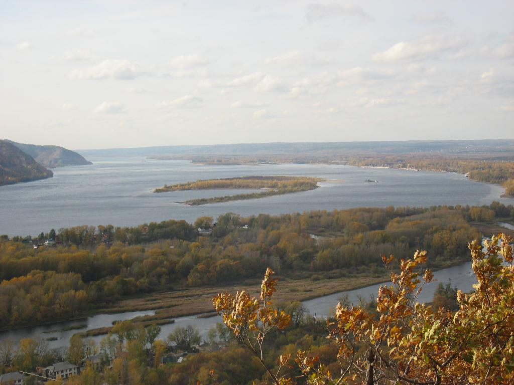 Осенняя Волга у Жигулей